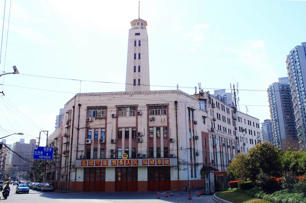 宜昌路救火会